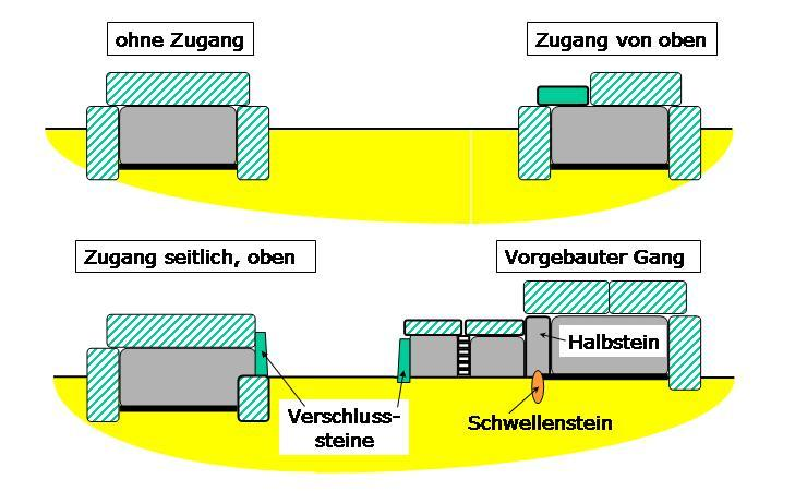 Urdolmen